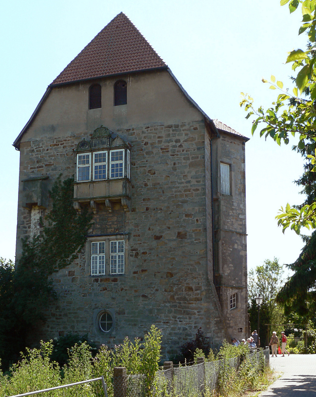 Wasserburg Sachsenhagen